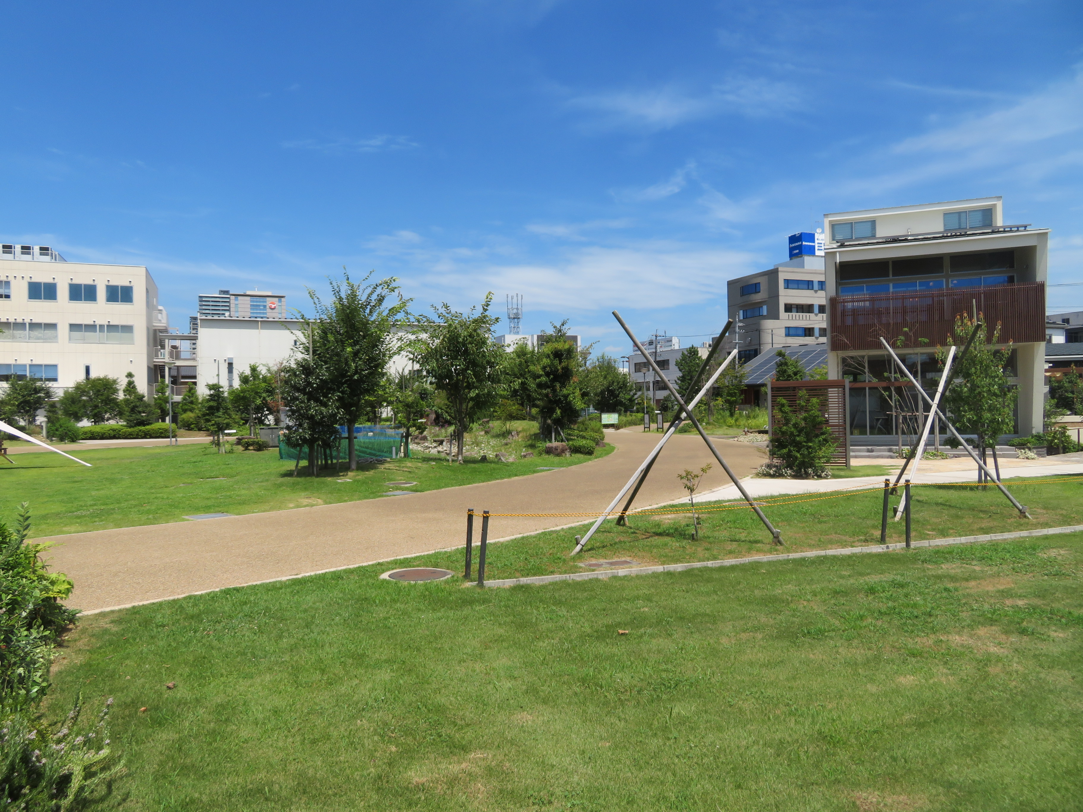 とよたエコフルタウン（豊田市元城町）